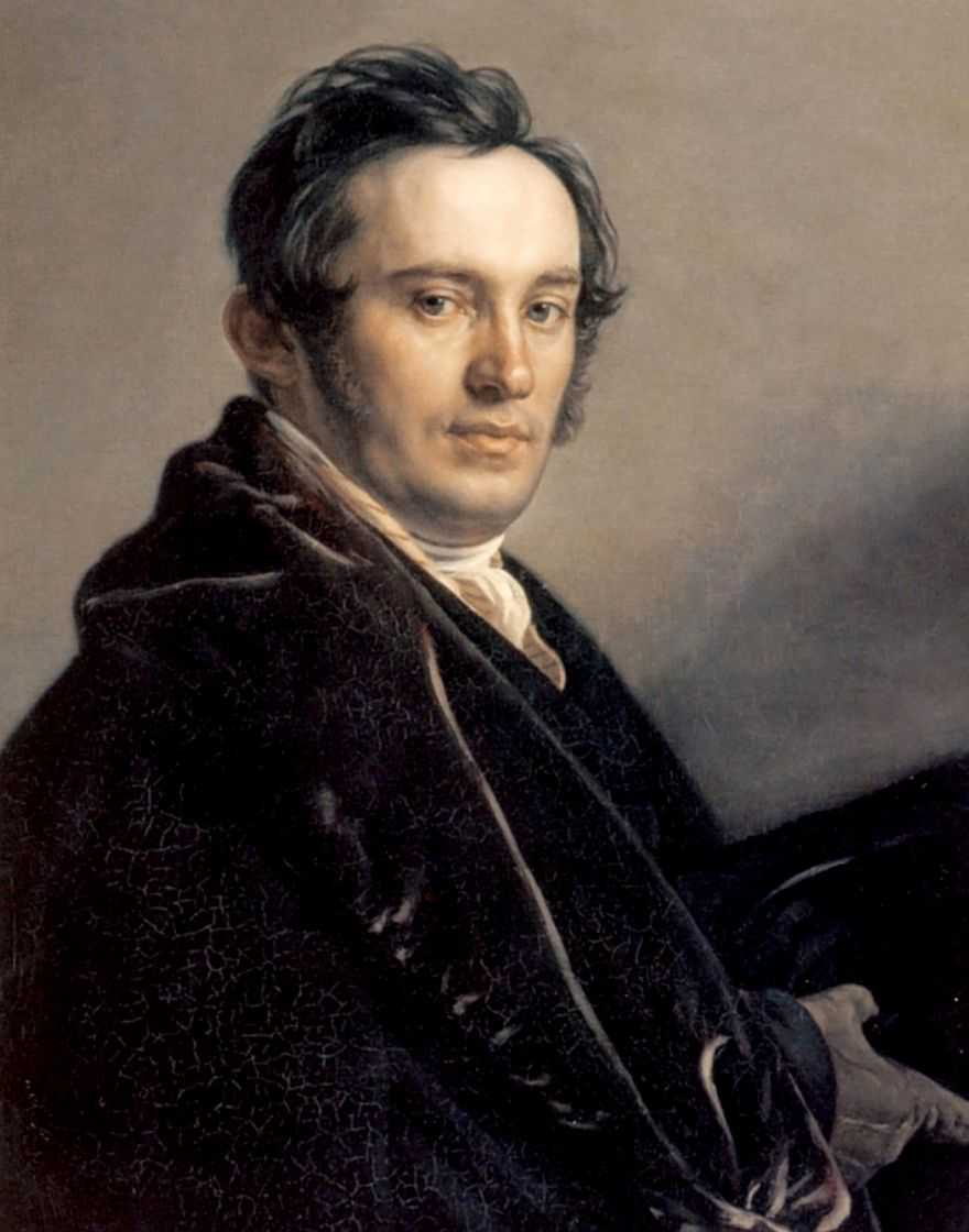 Портрет Василия Ивановича Григоровича. 1818